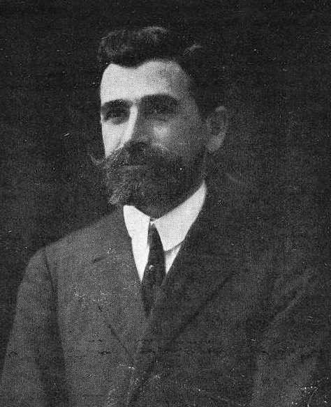 Antonio Usero Torrente, fotografía en Vida Gallega 1925